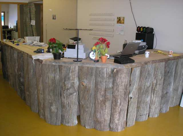 Kelohongasta tehty myyntitiski Kelohongasta tehty myyntitiski